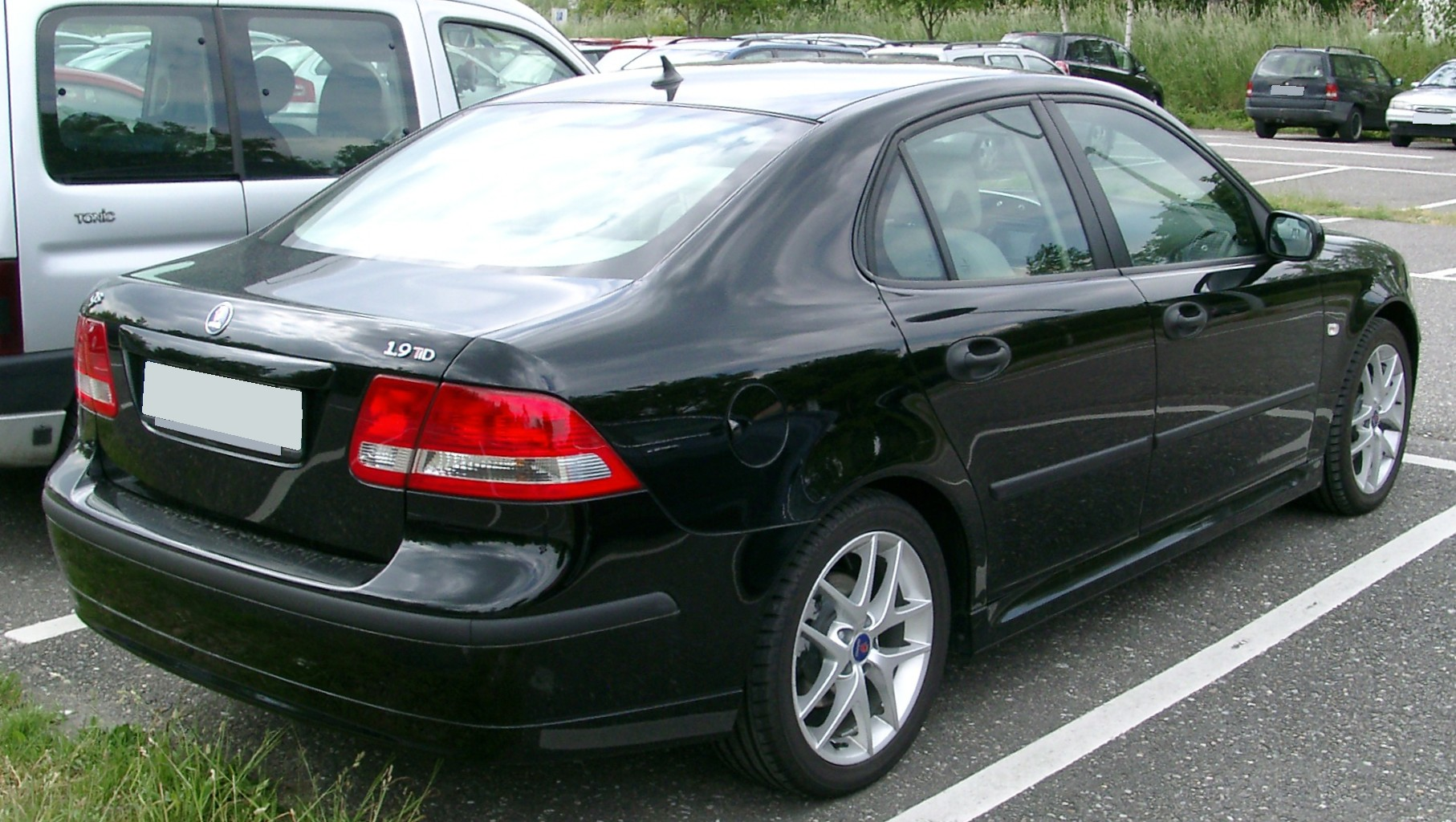 Saab 9-3